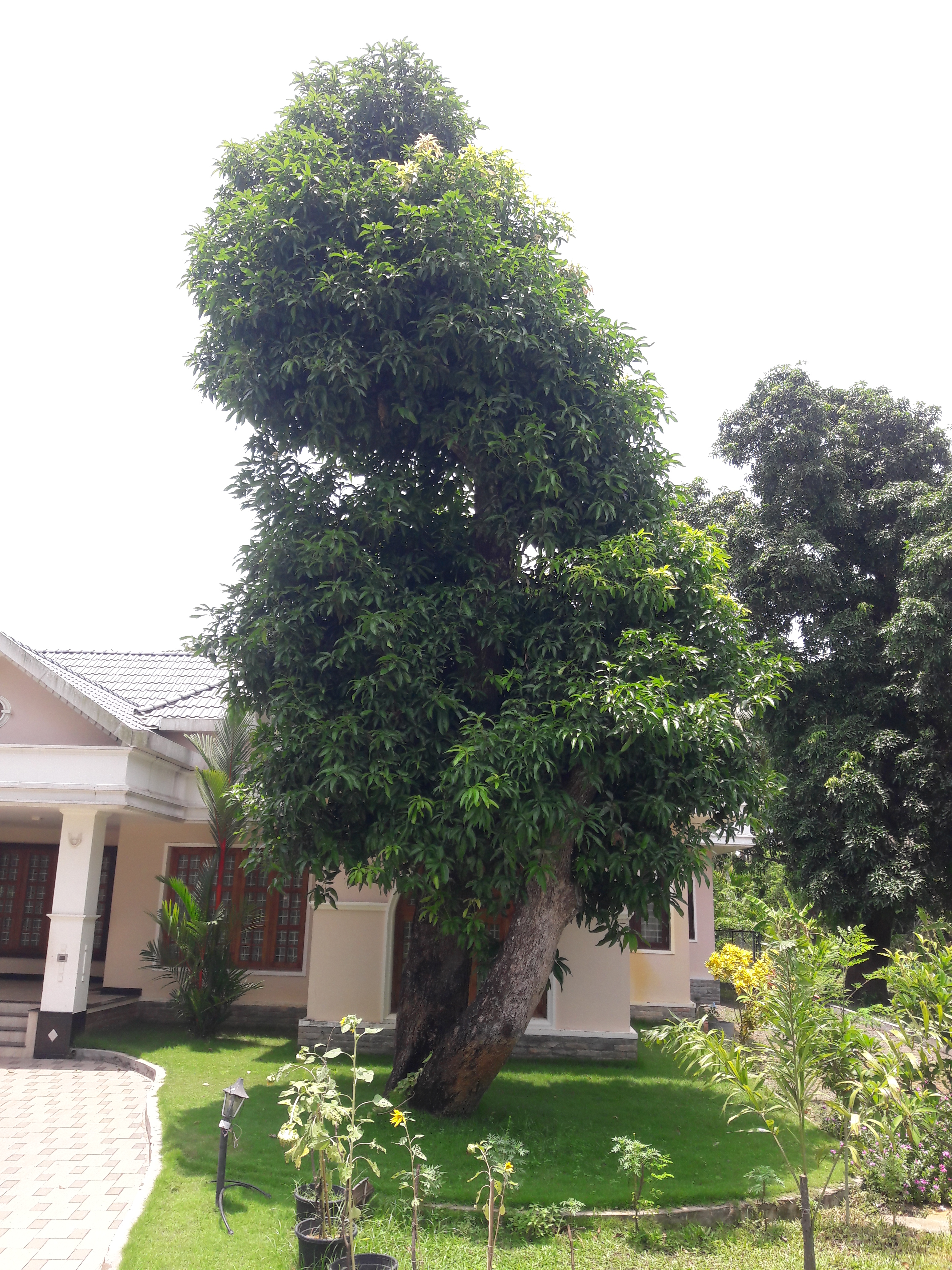 മരങ്ങളിലെ പുനർ യൗവന പ്രക്രിയ ചെയ്ത ശേഷം ഇലകള്‍ വരുന്ന മാവ്.